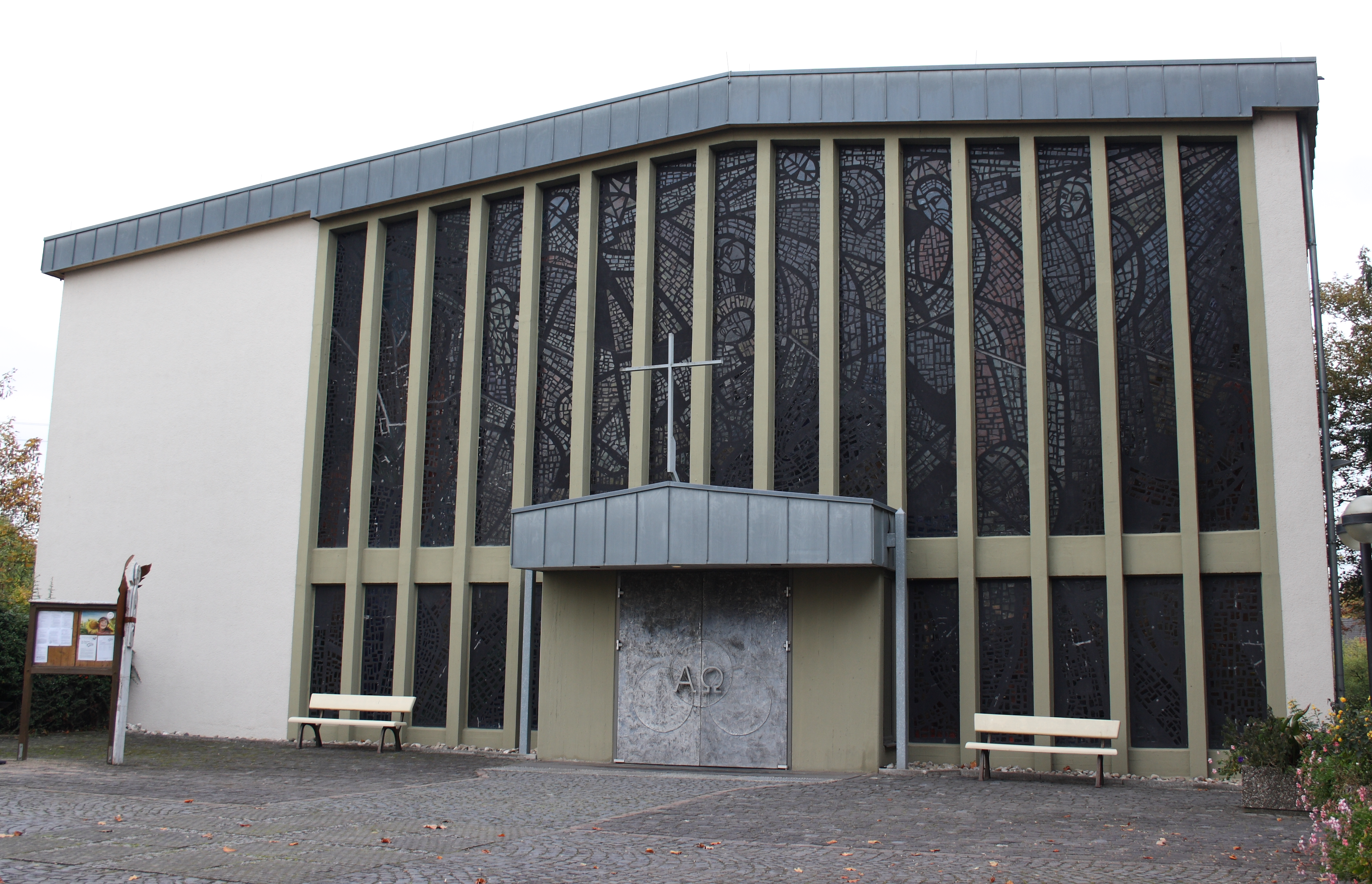 katholische Pfarrkirche Heilige Familie in Block